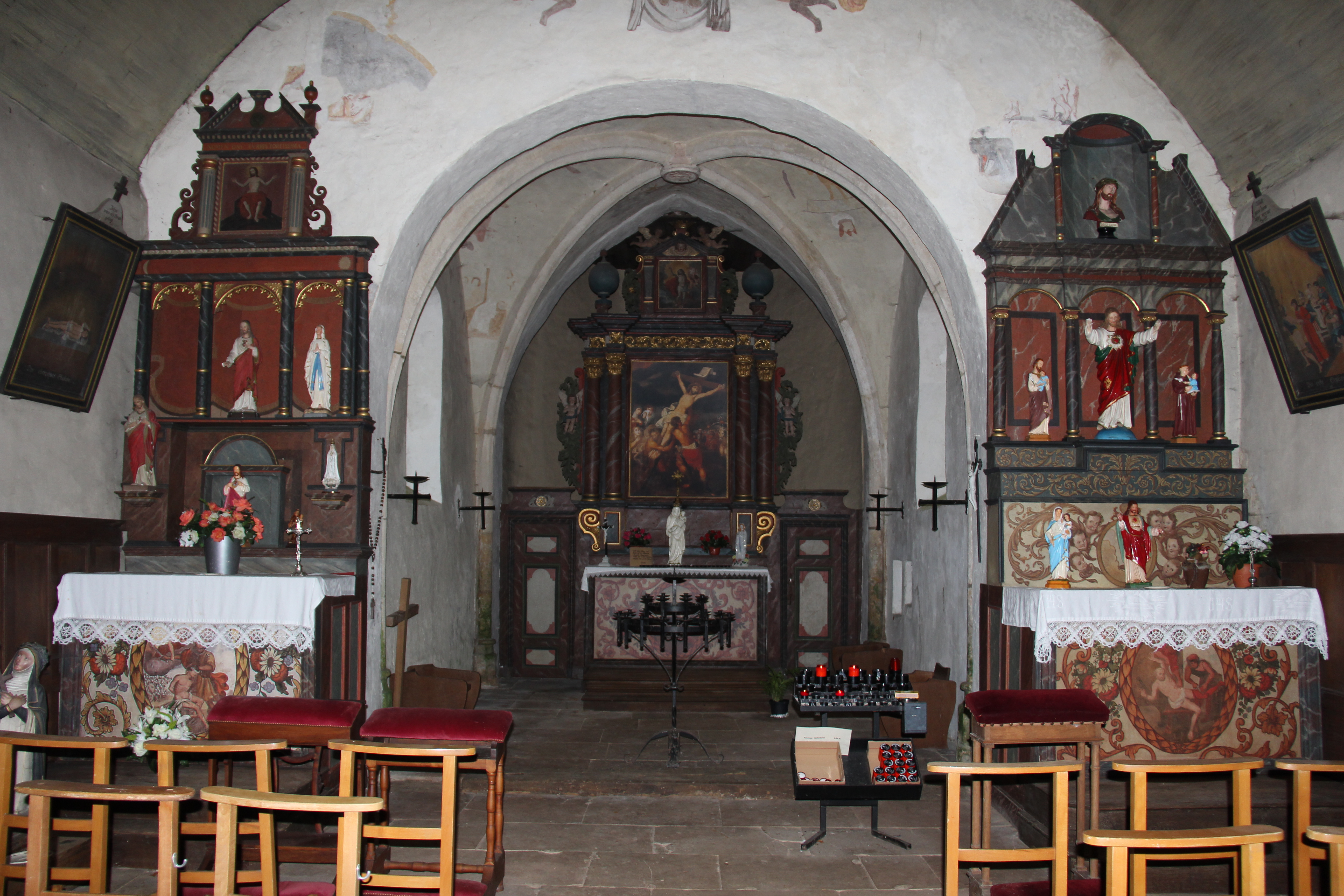 Den Haaptaltor an der Jobskapell um Kuelebierg (Biekerech) am Februar 2014.